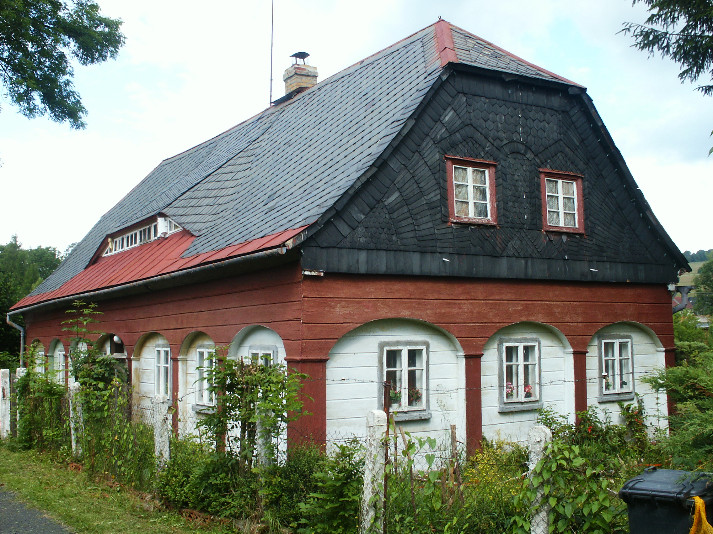 Kateřina - č.p. 23